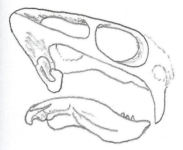 Skull of Robertia